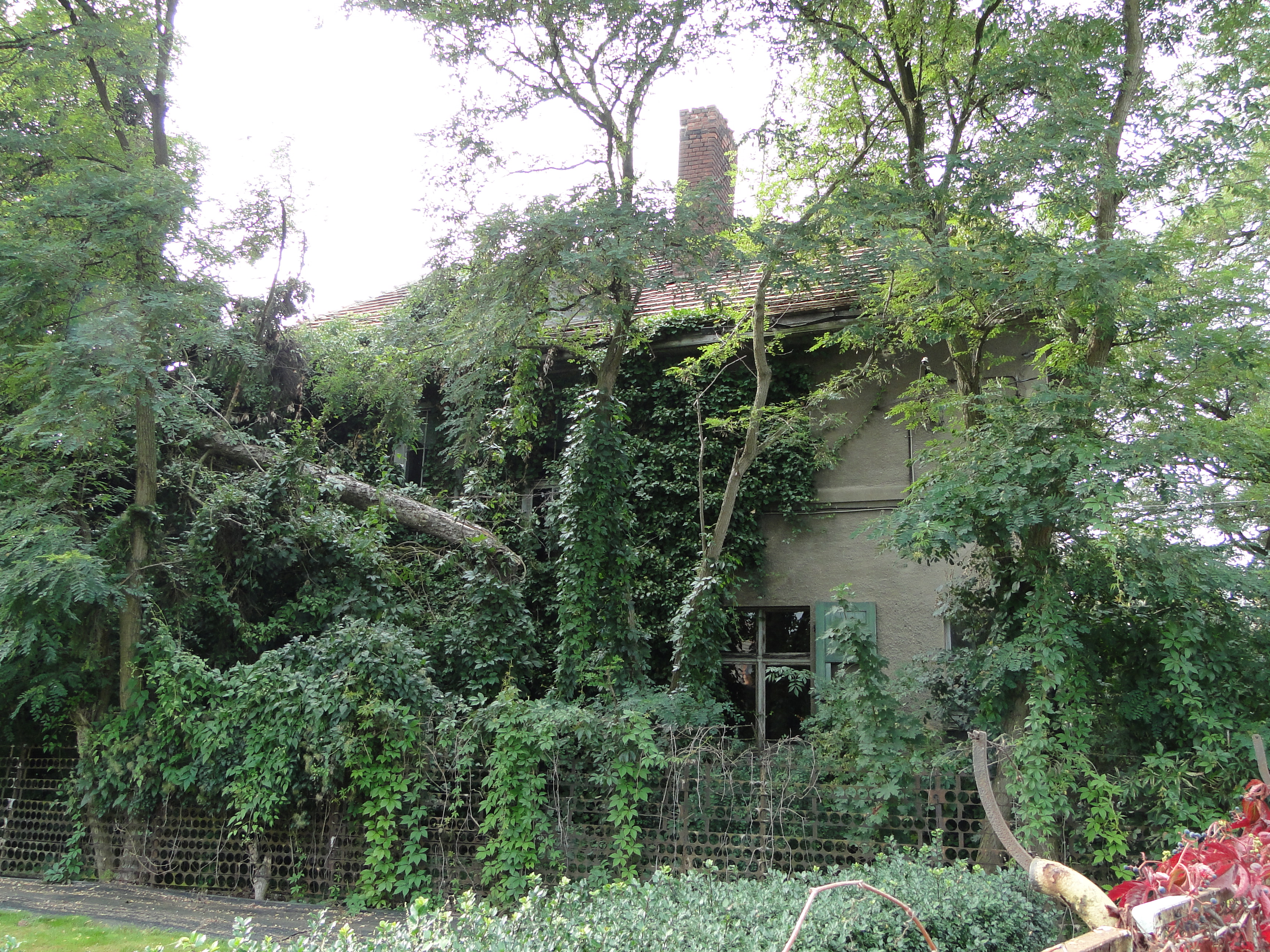 Willa Grünebergów przy ul. Batalionów Chłopskich 61 w Szczecinie (zdjęcie wykonano przed przesunięciem budynku)